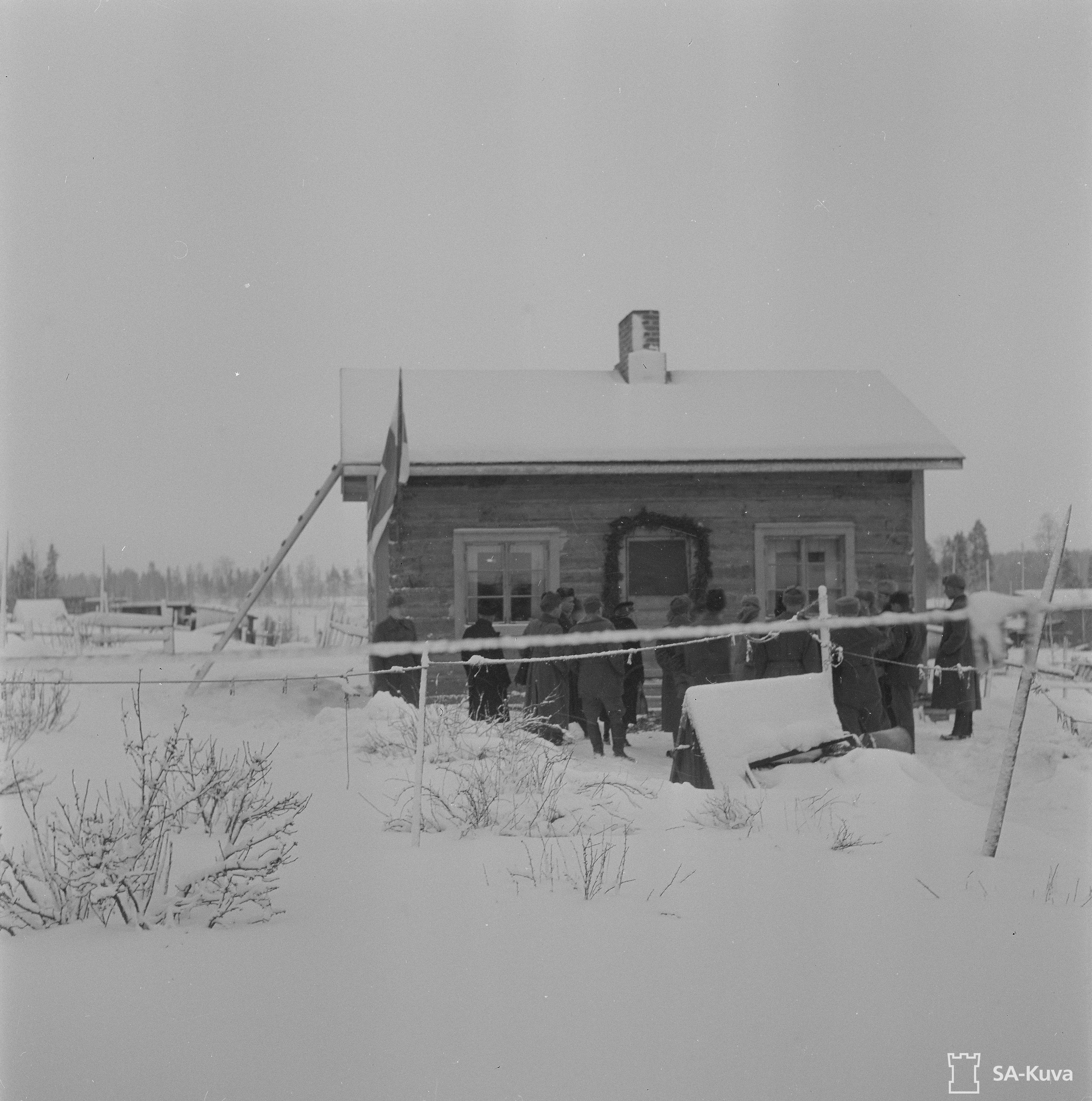 Mannerheim-ristin ritarin vääpeli Viljo Suokkaan vanhempien saama asevelitalo luovutuspäivänä 4.2.1943